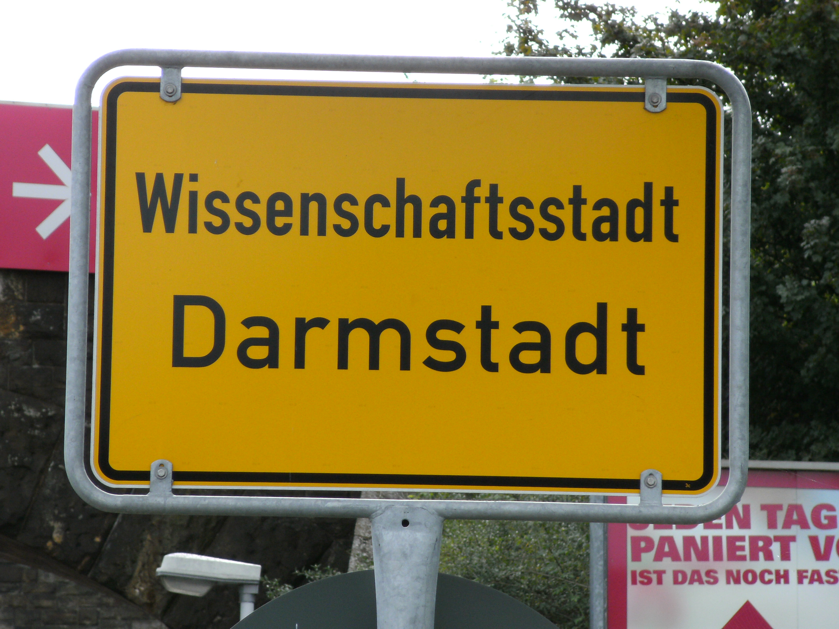 Ortsschild von Darmstadt (Hessen)